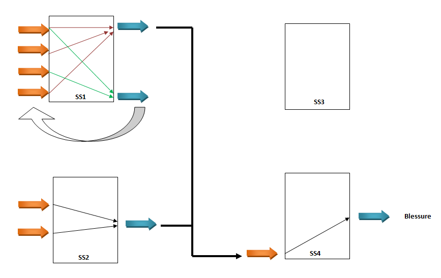 Enchainement possible d'ENS